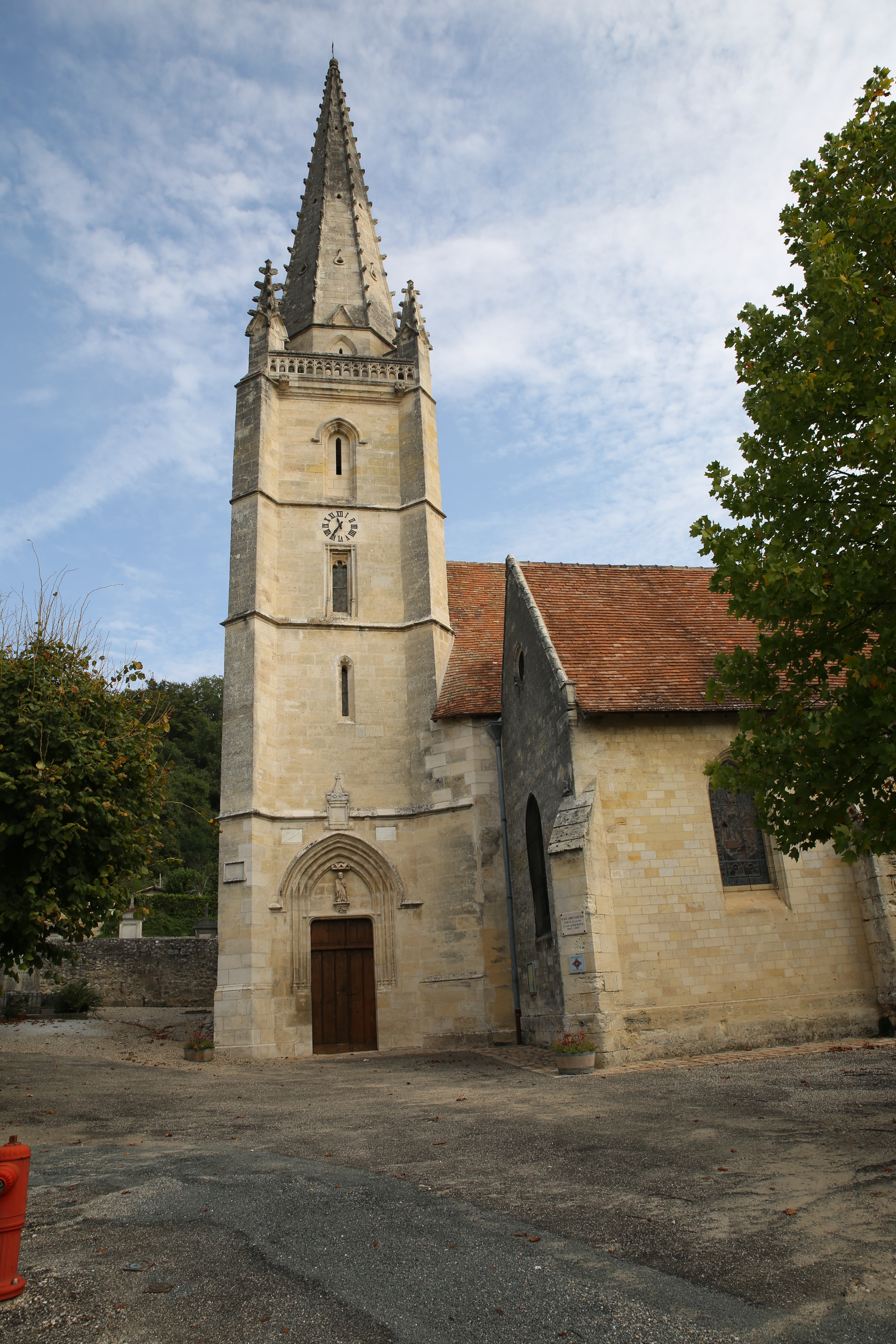 Église Saint-Saturnin de Baurech .